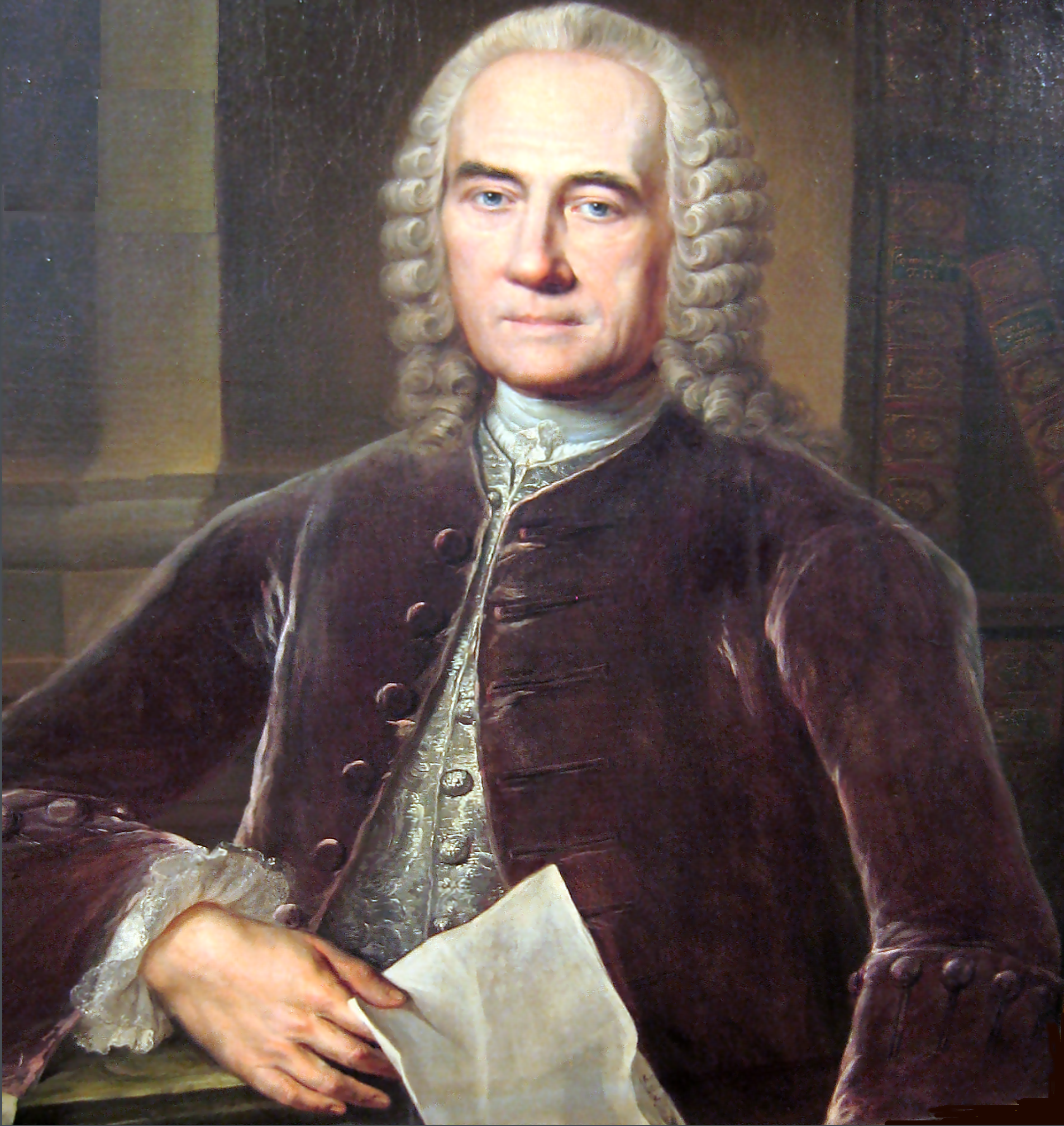 Jacob Theodor Klein (1685-1759)